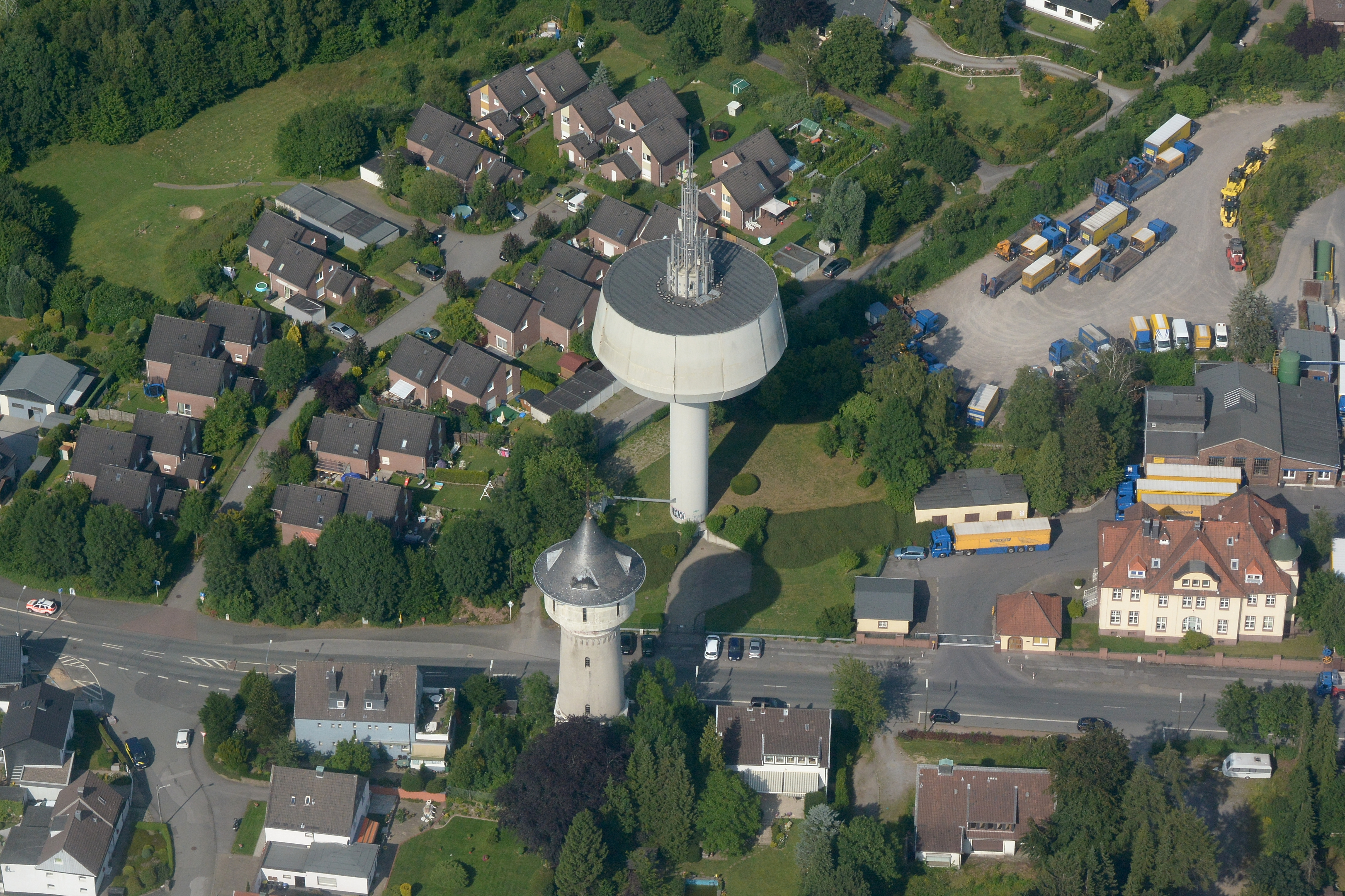 Hatzfelder Wassertürme